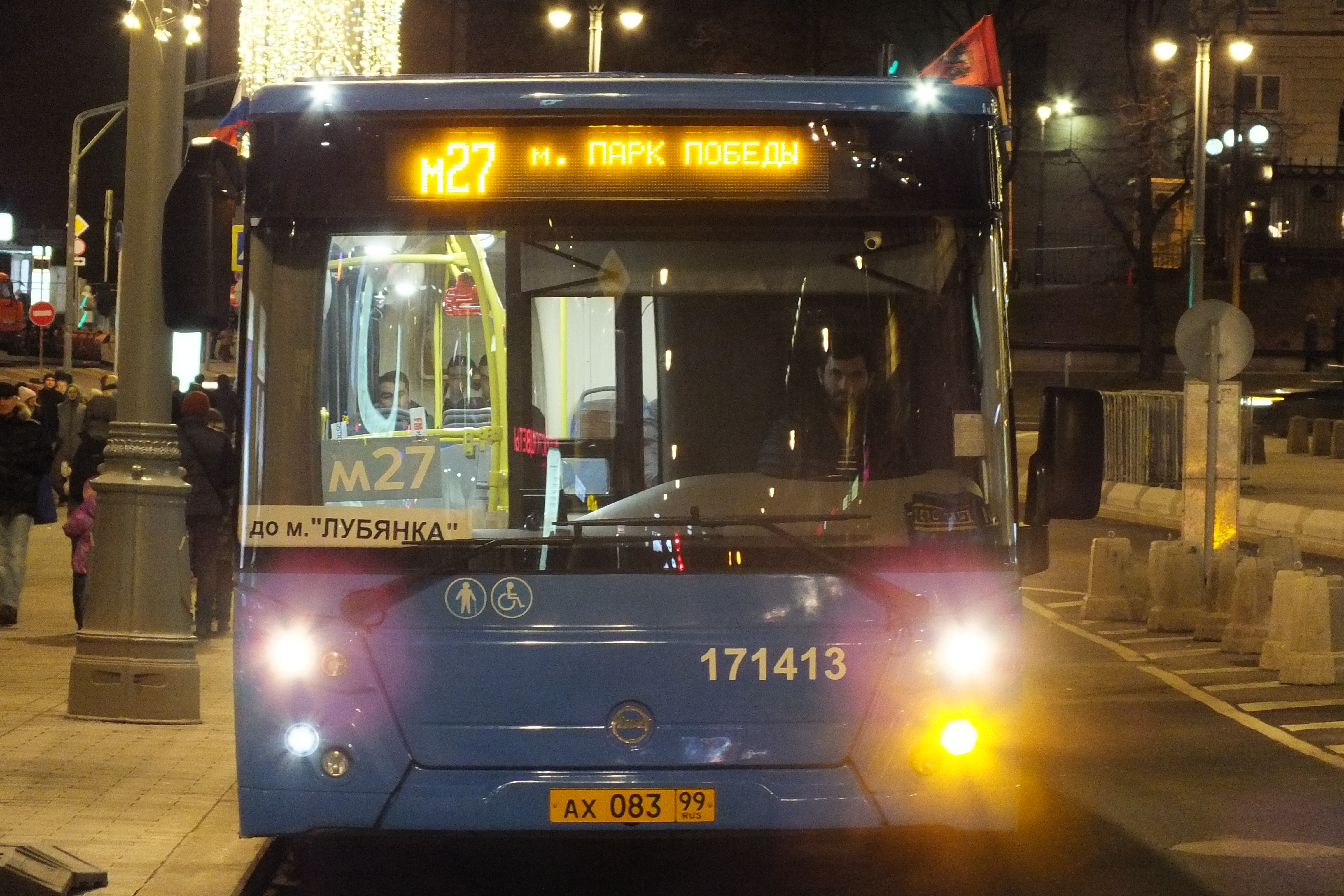 Автобус маршрута м27 отправляется от станции метро «Китай-город» (Славянская площадь) 1 января 2018 года ночью